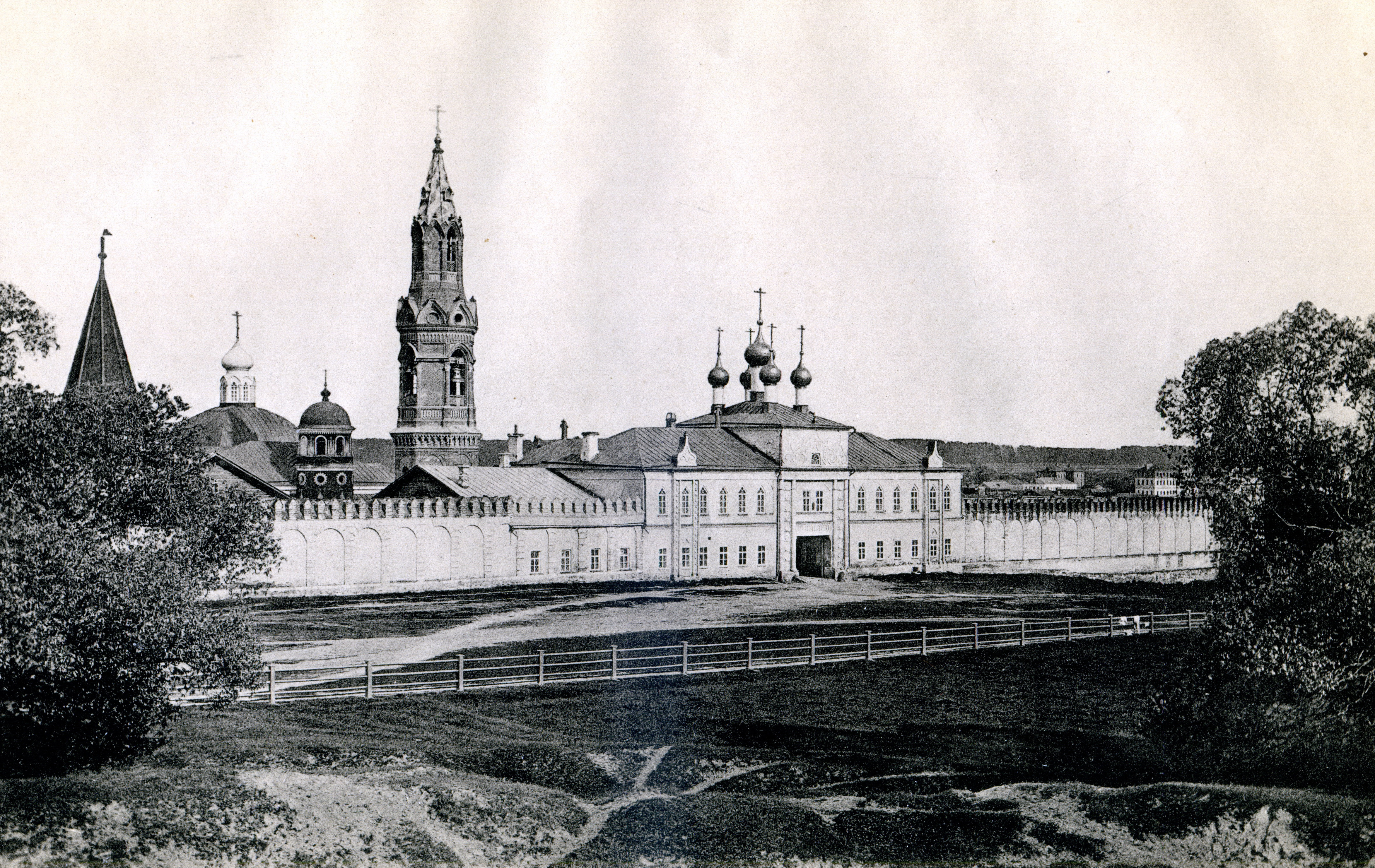 Московский Никольский единоверческий монастырь